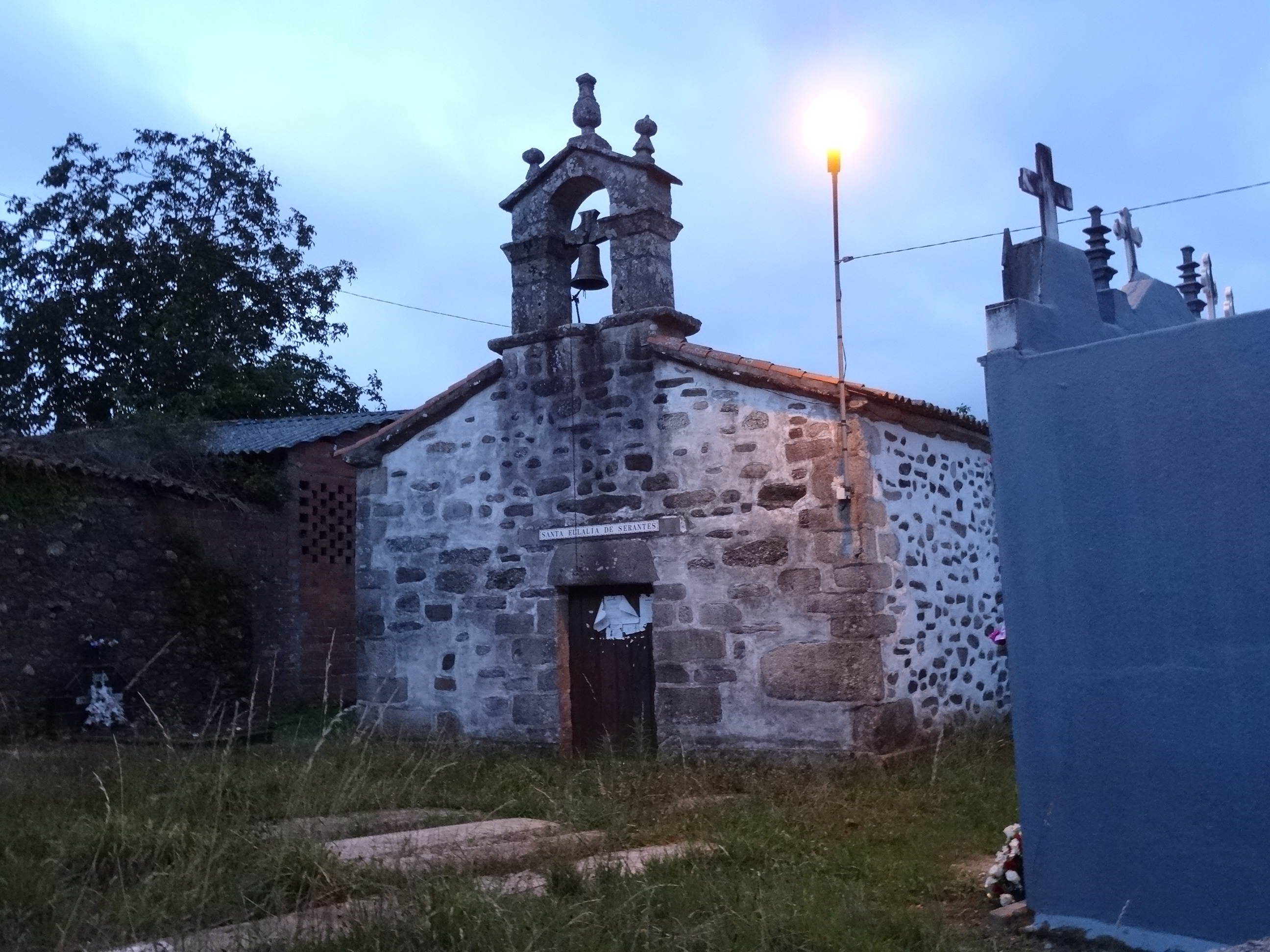 Igrexa de Serantes, no concello de Santiso, provincia da Coruña.